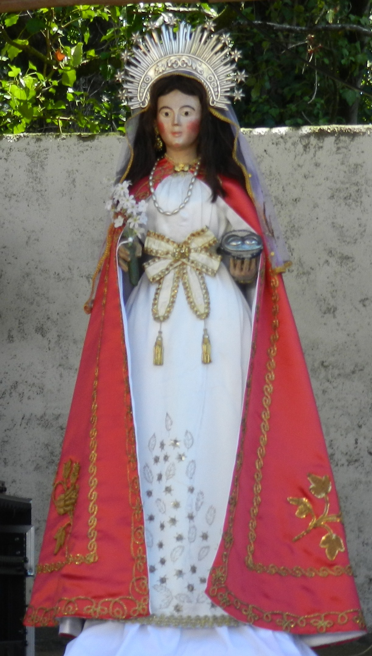 Imagen de Santa Lucía, de la iglesia de Santalla de Rey (Puebla del Brollón).